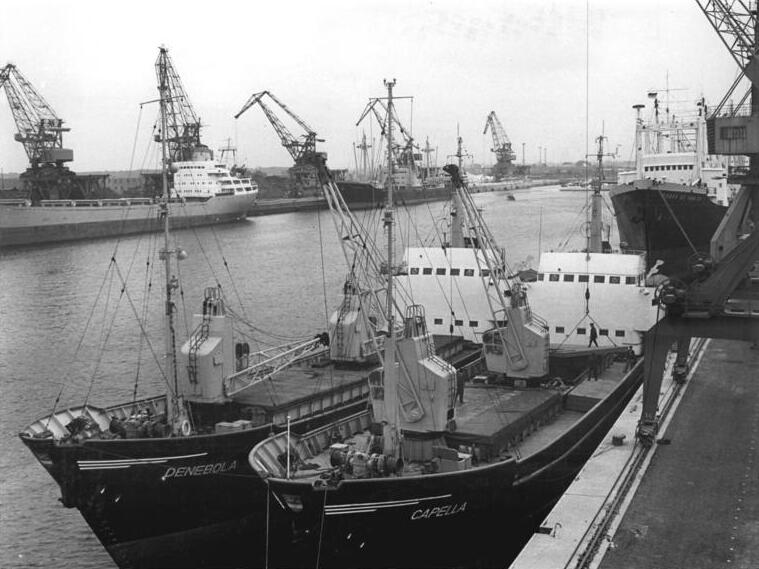 Rostock, Überseehafen, Englische Frachter Zentralbild Sindermann 1.10.1968 Rostock: Schiffs-Liniendienst nach England ab Rostock Der England-Liniendienst der Deutschen Seereederei, der seit 1961 vom Wismarer Hafen aus erfolgte, wird ab 1. Oktober 1968 im Rostocker Überseehafen abgewickelt. Die Frachten sind zu etwa 50 Prozent Transitgut. Als erste Ladung nahm MS "Capella" 70 Wartburgs und MS "Denebola" Zwiebeln aus Ungarn an Bord.